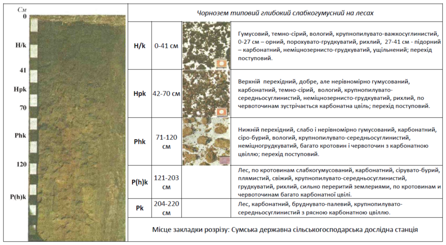 Профіль чорнозему типового глибокого слабкогумусного на лесах